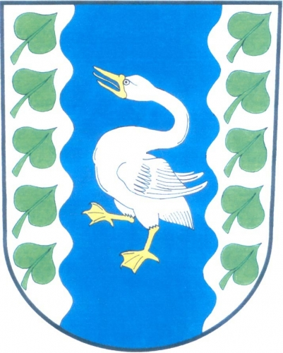 znak, Myštice, okres Strakonice